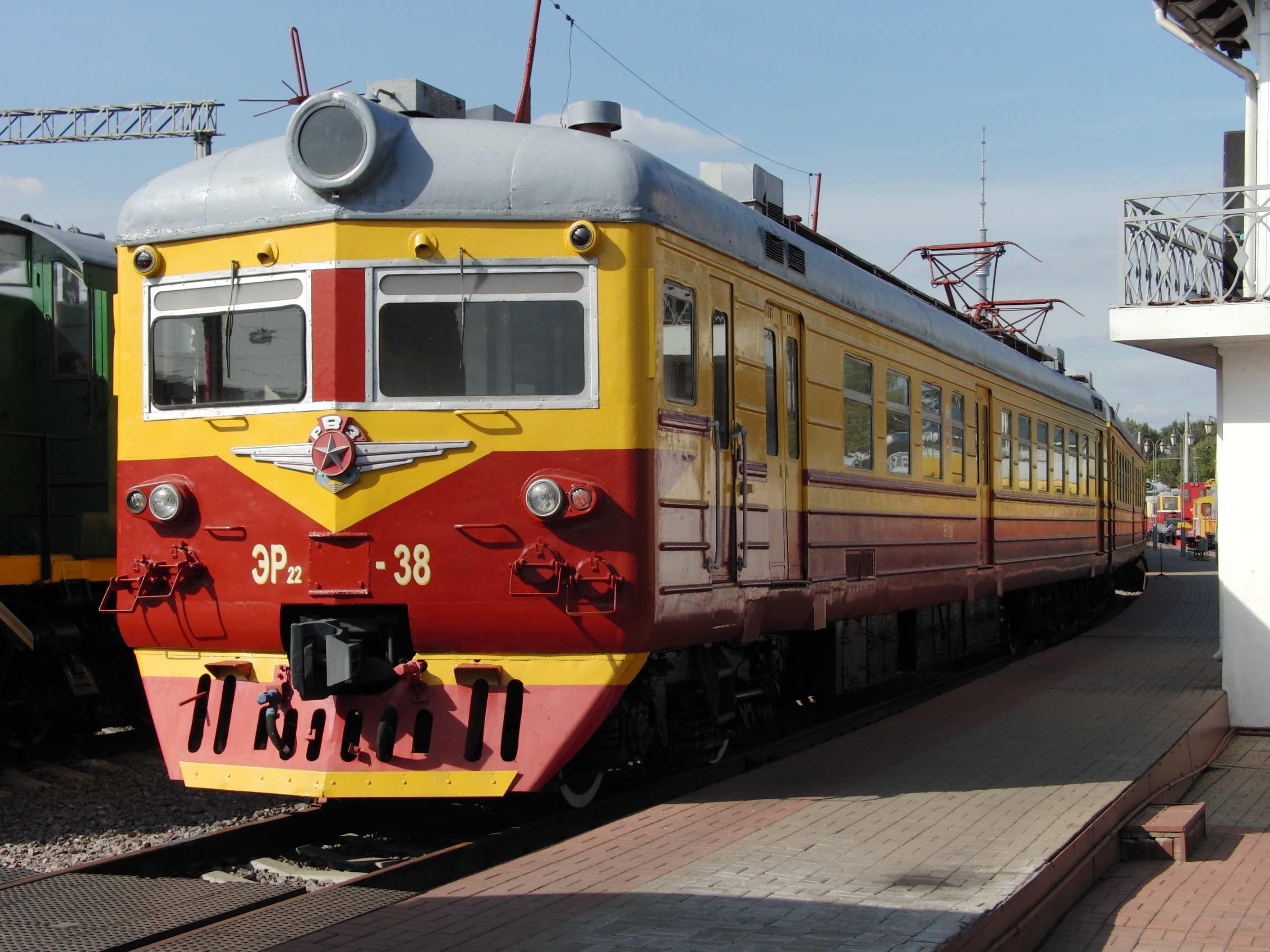 ER22 (ЭР22) electric train